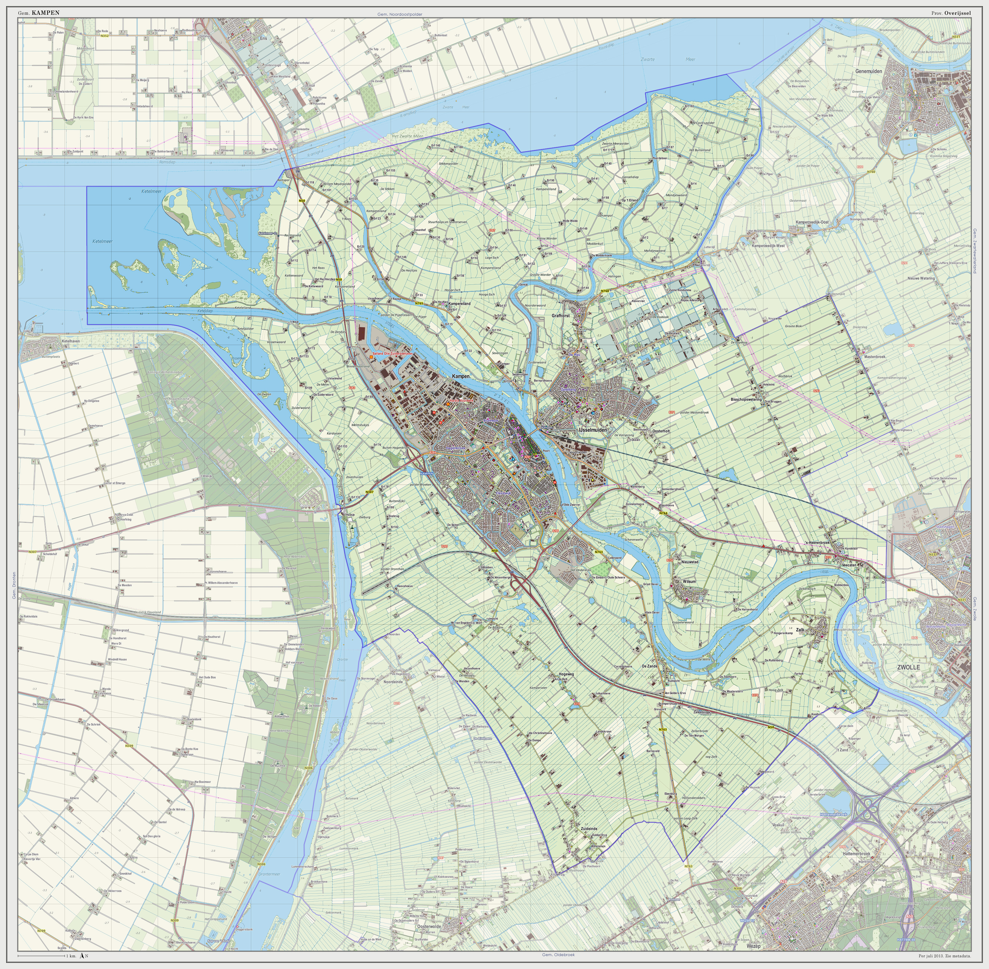 Topografische kaart van gemeente Kampen (2013). Samengesteld door Jan-Willem van Aalst op basis van de GML open geodata van de BRT/Top10NL (basisregistratie Topografie, Kadaster 2011), vrijgegeven door Kadaster onder de Creative Commons BY licentie. Additionele gegevens uit BAG (8 juli 2013), uit de Open Street Map (9 juli 2013) en uit de Risicokaart. Peildatum kaartbeeld: 9 juli 2013. Zie ook Gemeentenatlas.nl Samenstelling en kleurenschema: Jan-Willem van Aalst, met QuantumGIS en Photoshop. Zie ook de Legenda.